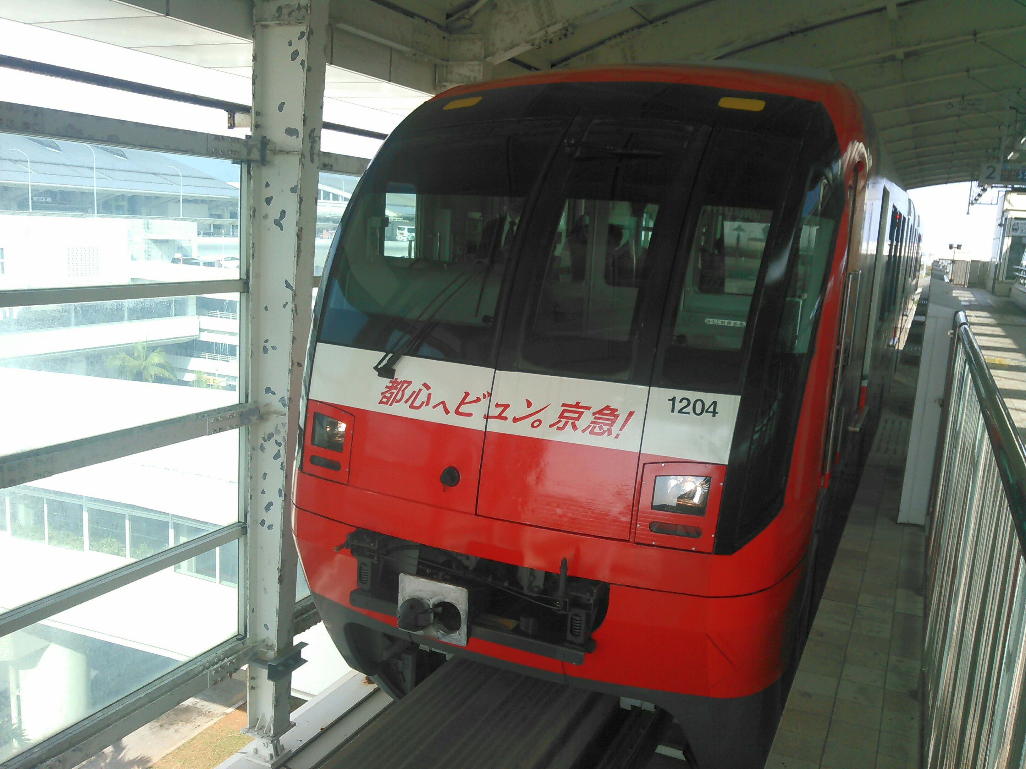 沖繩單軌電車京急彩繪車於那覇機場站